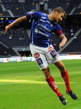 Daniel Hallingström